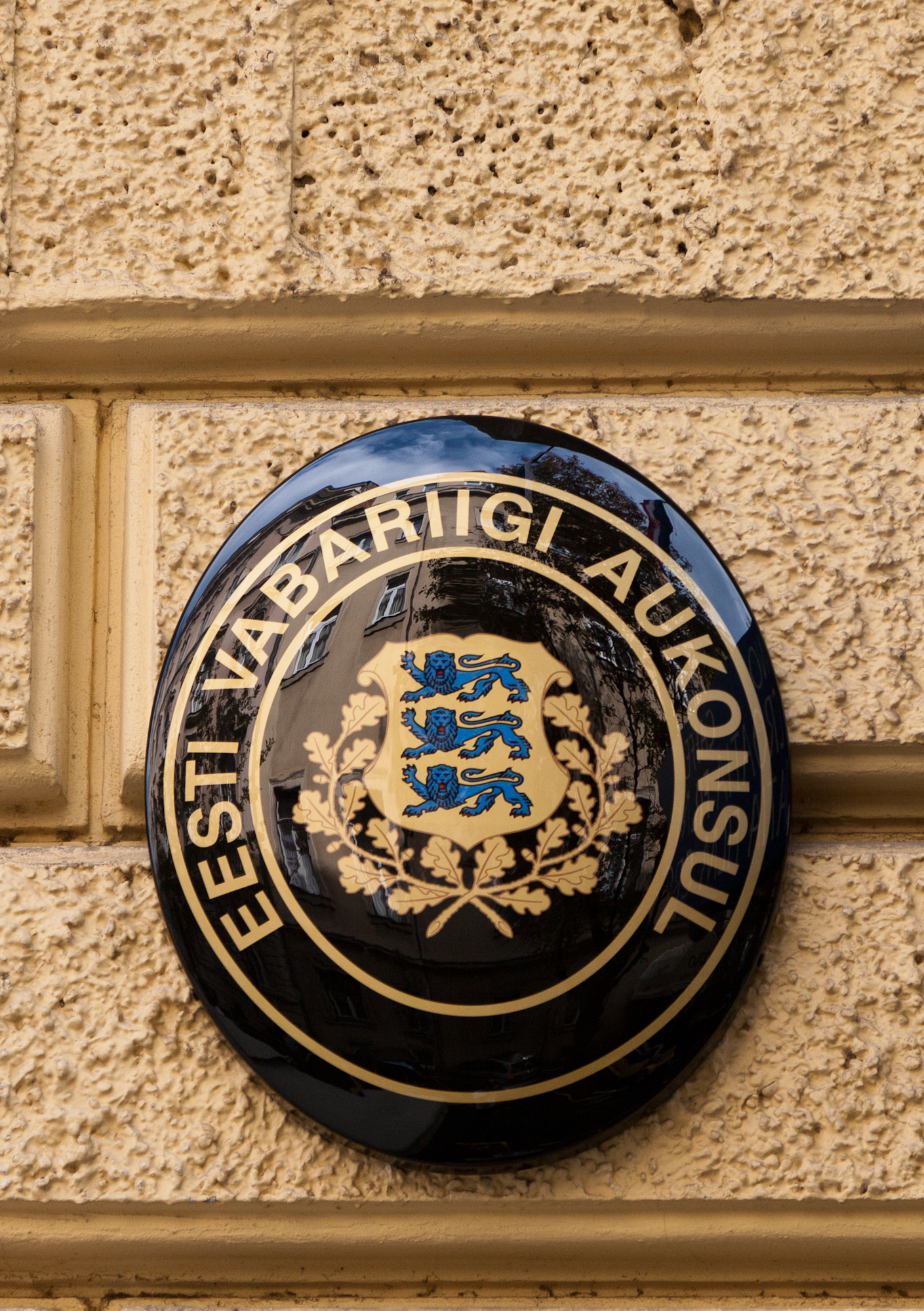 Aukonsulaadi asukohta tähistav silt Zagrebis